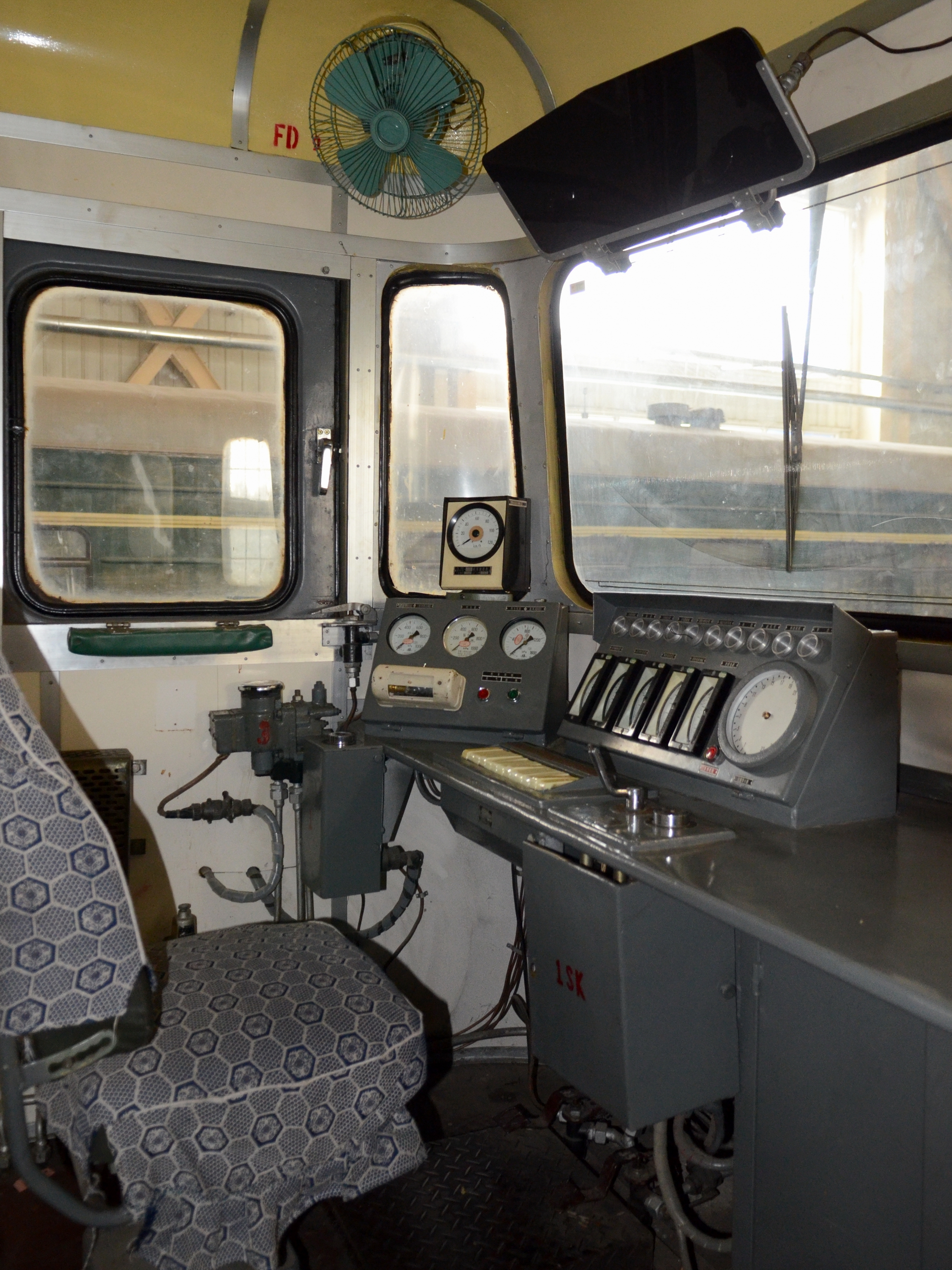 中文（中国大陆）: 保存在中国铁道博物馆的韶山1型008号车的驾驶室